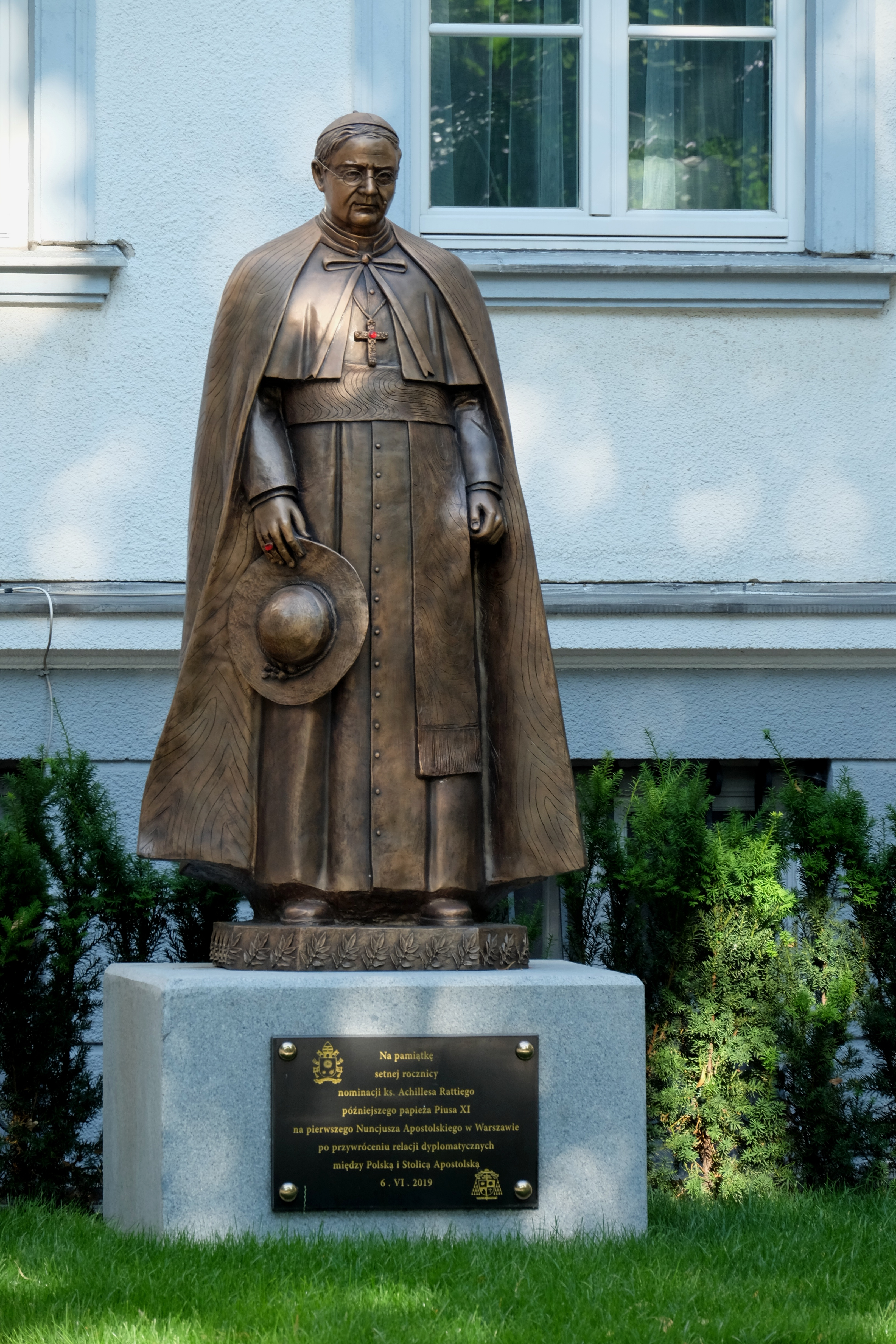 Pomnik Achillesa Rattiego w Warszawie lub Pomnik Piusa XI w Warszawie znajdujący się na terenie Nuncjatury Stolicy Apostolskiej w Polsce przy Alei Jana Chrystiana Szucha na warszawskim Śródmieściu.